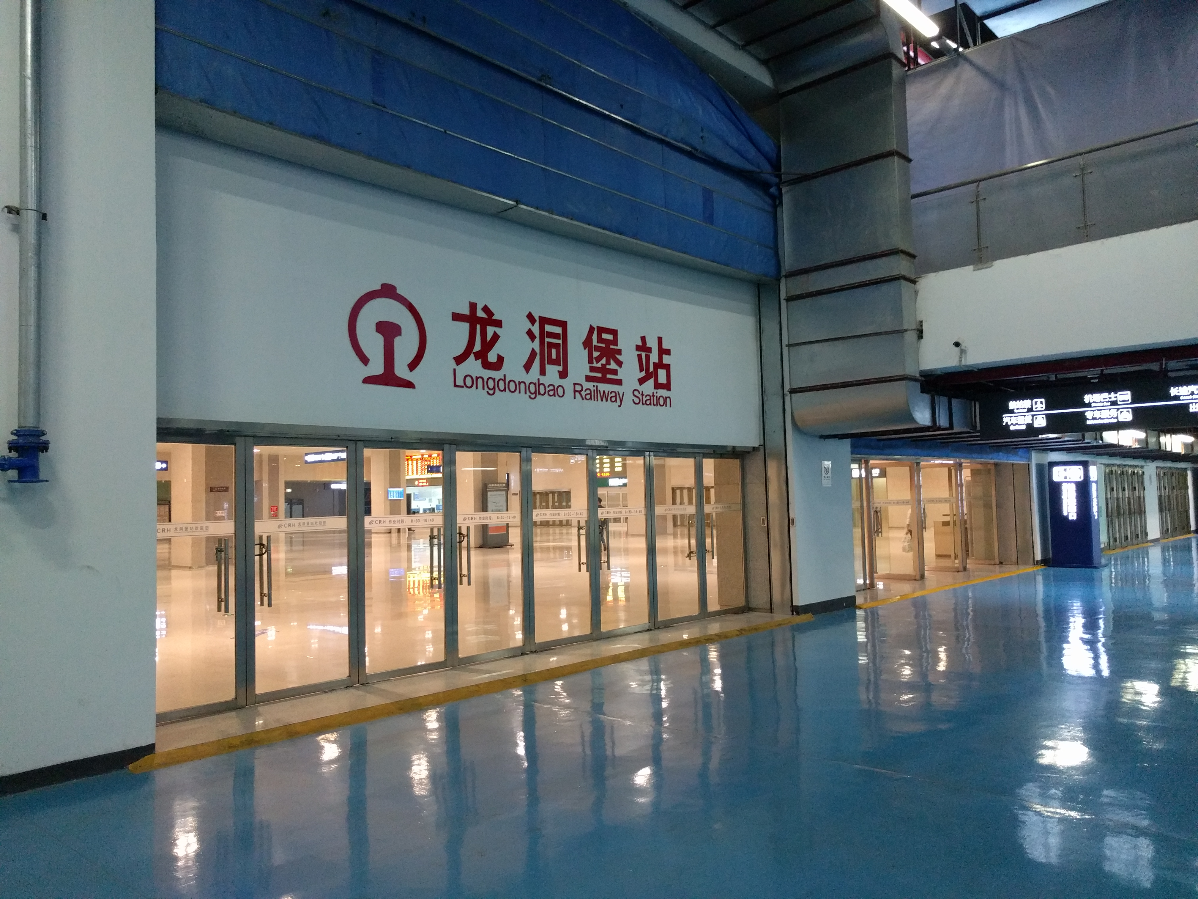 中文（中国大陆）: 贵阳龙洞堡高铁站